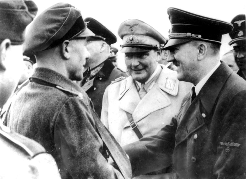 ADN-ZB/Archiv II.Weltkrieg 1939 - 1945 Hitler (r. ) besucht Anfang April 1945 in Begleitung von Göring (m.) und dem Chef des OKW, Generalfeldmarschall Keitel (halbverdeckt), eine Truppeneinheit der faschistischen deutschen Wehrmacht.